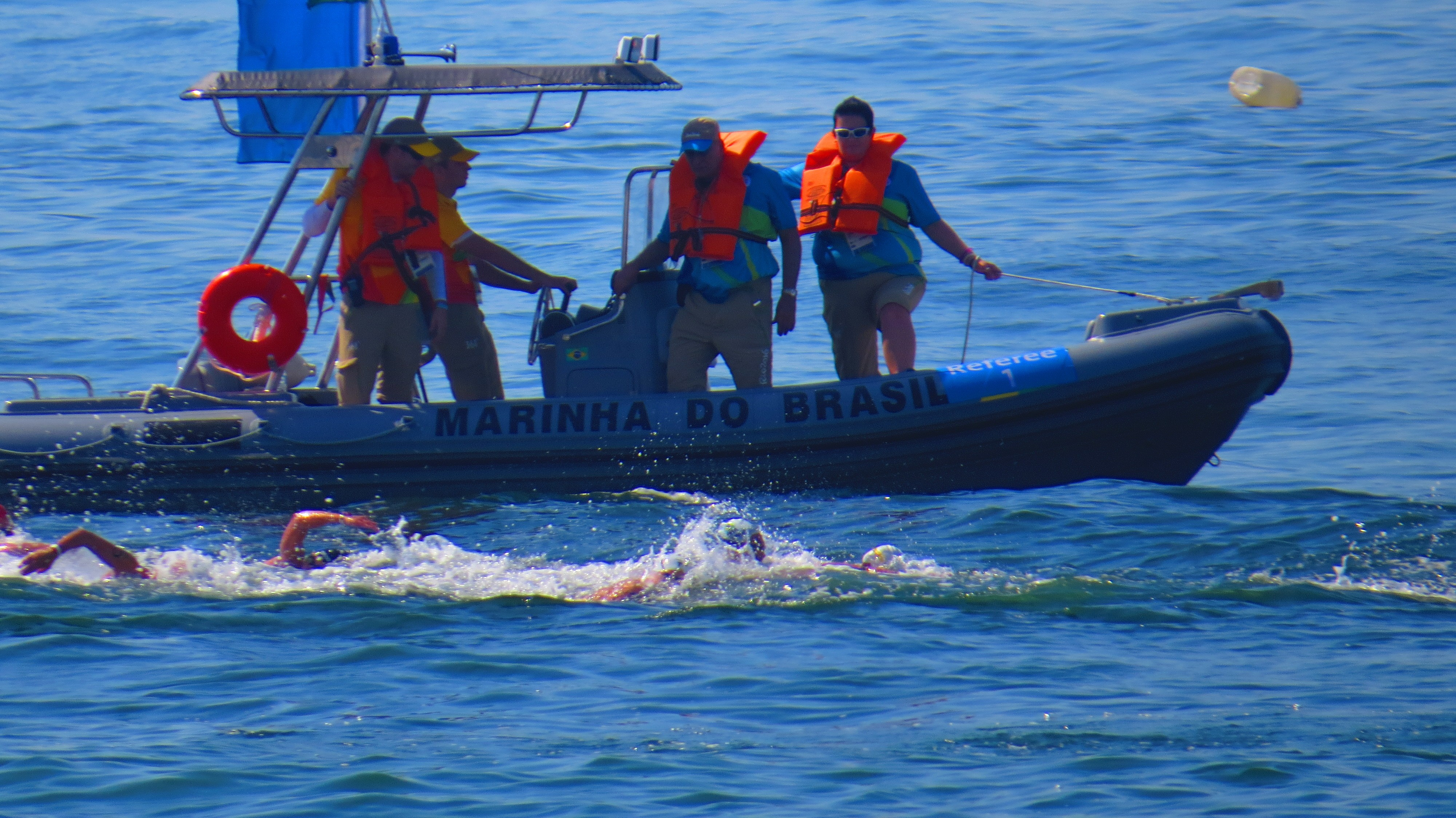 sx50